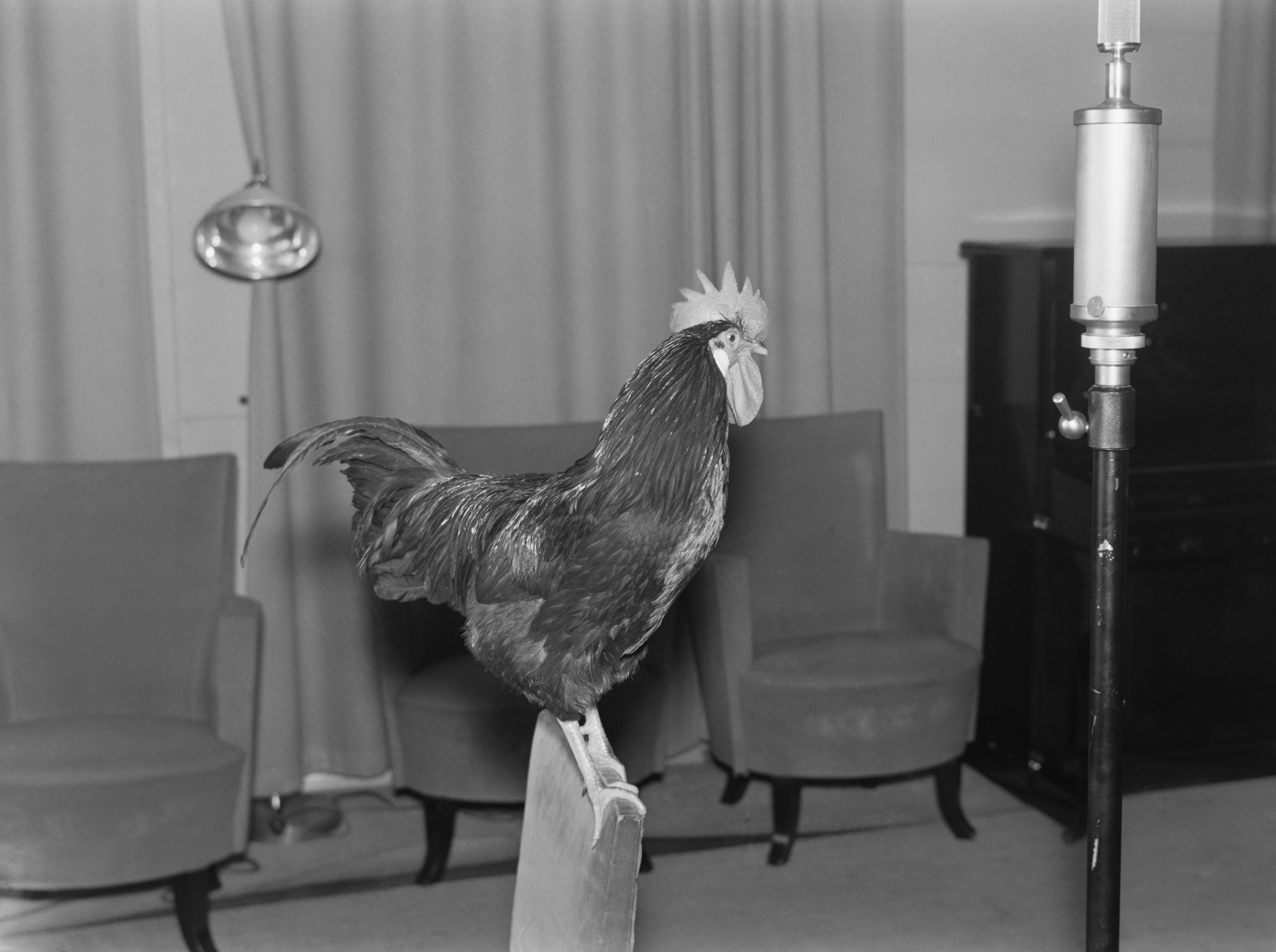 Elävä kukko (aamukukko) Yleisradion radiostudiossa. Kuvausaika arvioitu vuosikymmenen tarkkuudella. Tiedätkö jotain tästä kuvasta? Jätä kommentti tai ota yhteyttä sähköpostitse: Tutustu Ylen arkistosisältöihin: Fler skatter från Yles arkiv: More about Yle, the Finnish Broadcasting Company